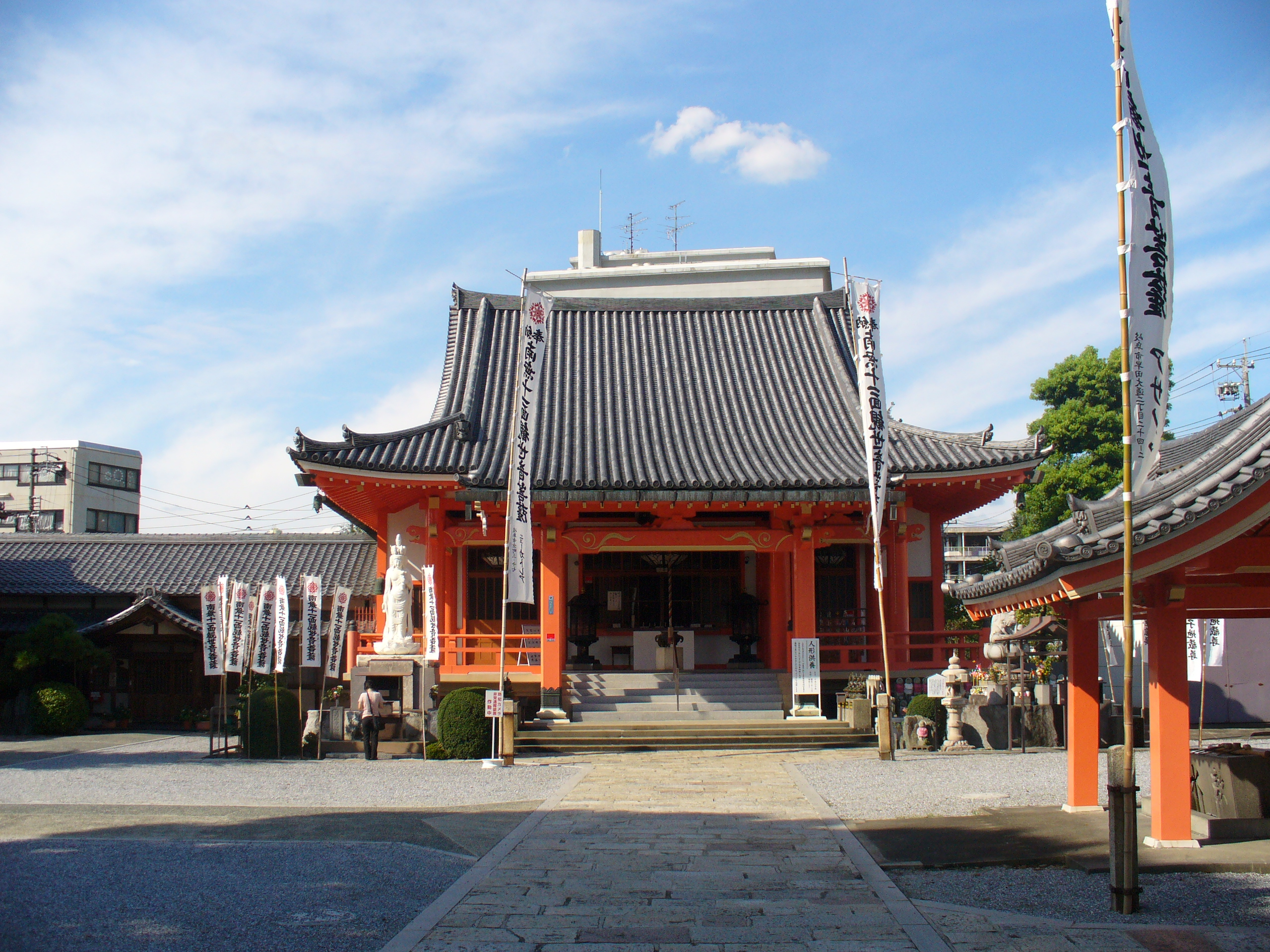 Mieji （美江寺）,Gifu,Gifu(岐阜県岐阜市)で撮影。美江寺観音。